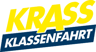 Logo der Webserie "Krass Klassenfahrt" seit der zweiten Staffel